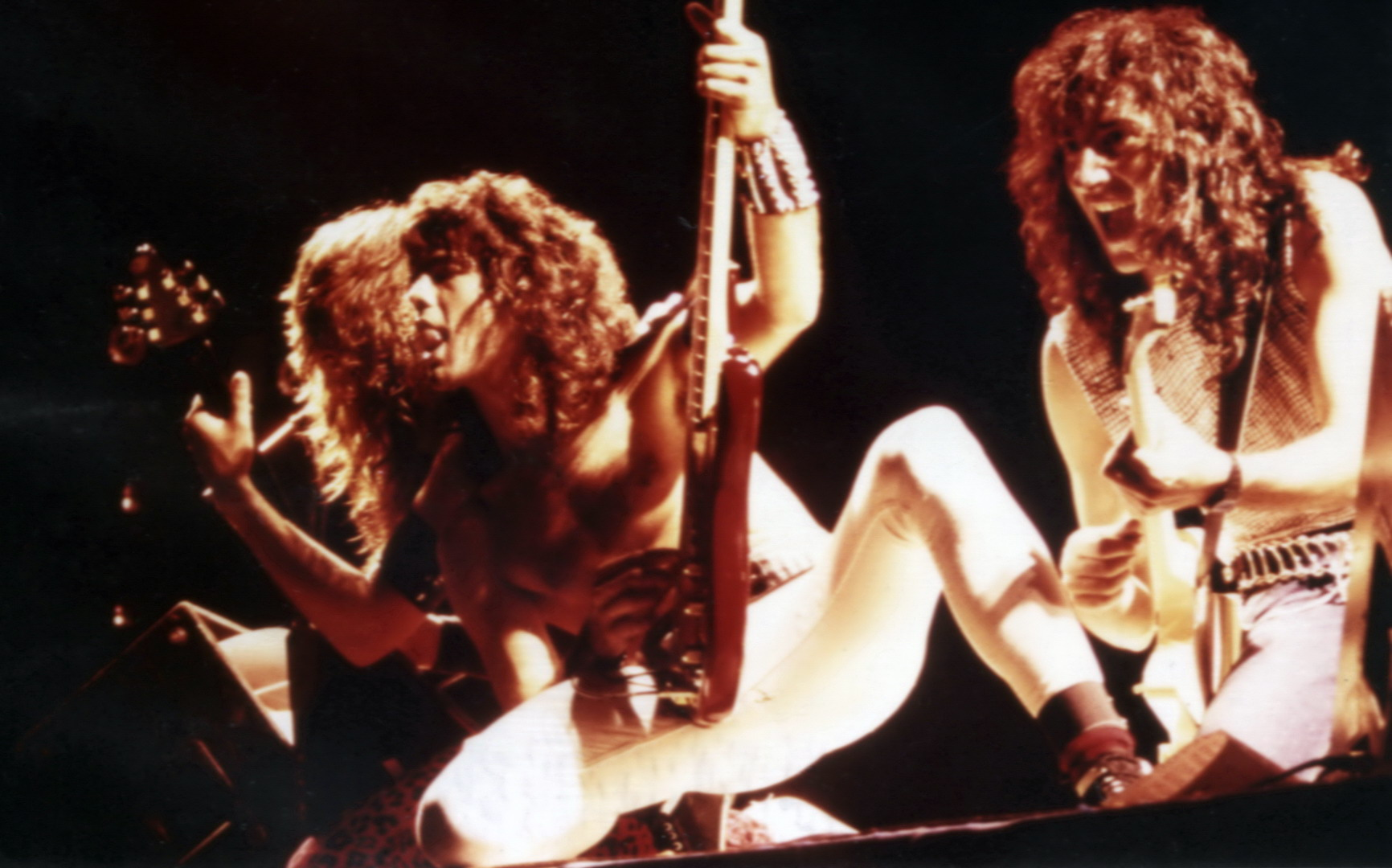 Mazarron 85 Santi con Robert Manu en ación